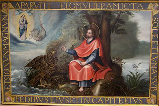 Diego de Aguilar, San Juan Evangelista en Patmos, convento de madres dominicas de Santo Domingo el Real, Toledo.